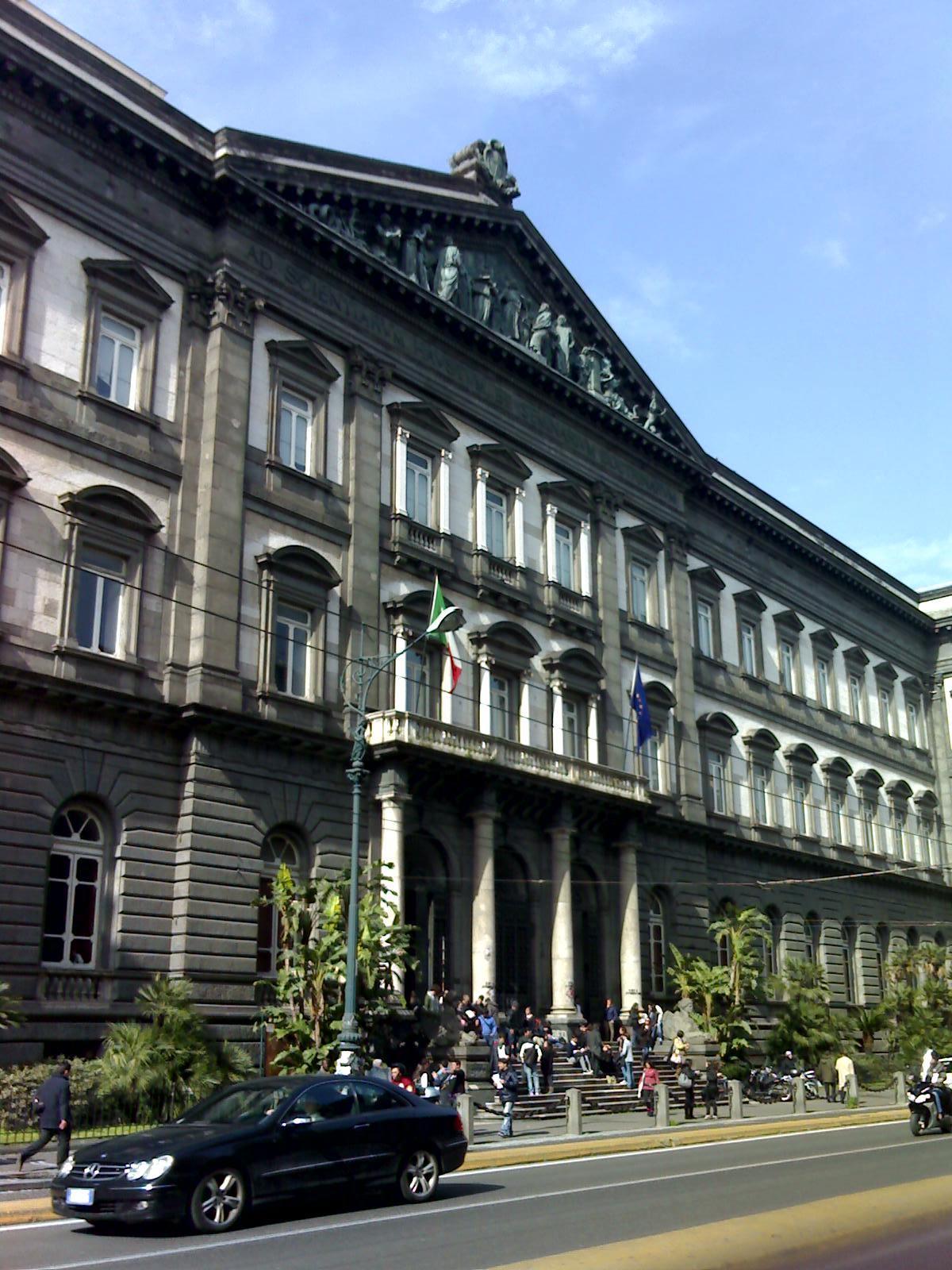 Palazzo della facoltà di giurisprudenza di Napoli Federico II